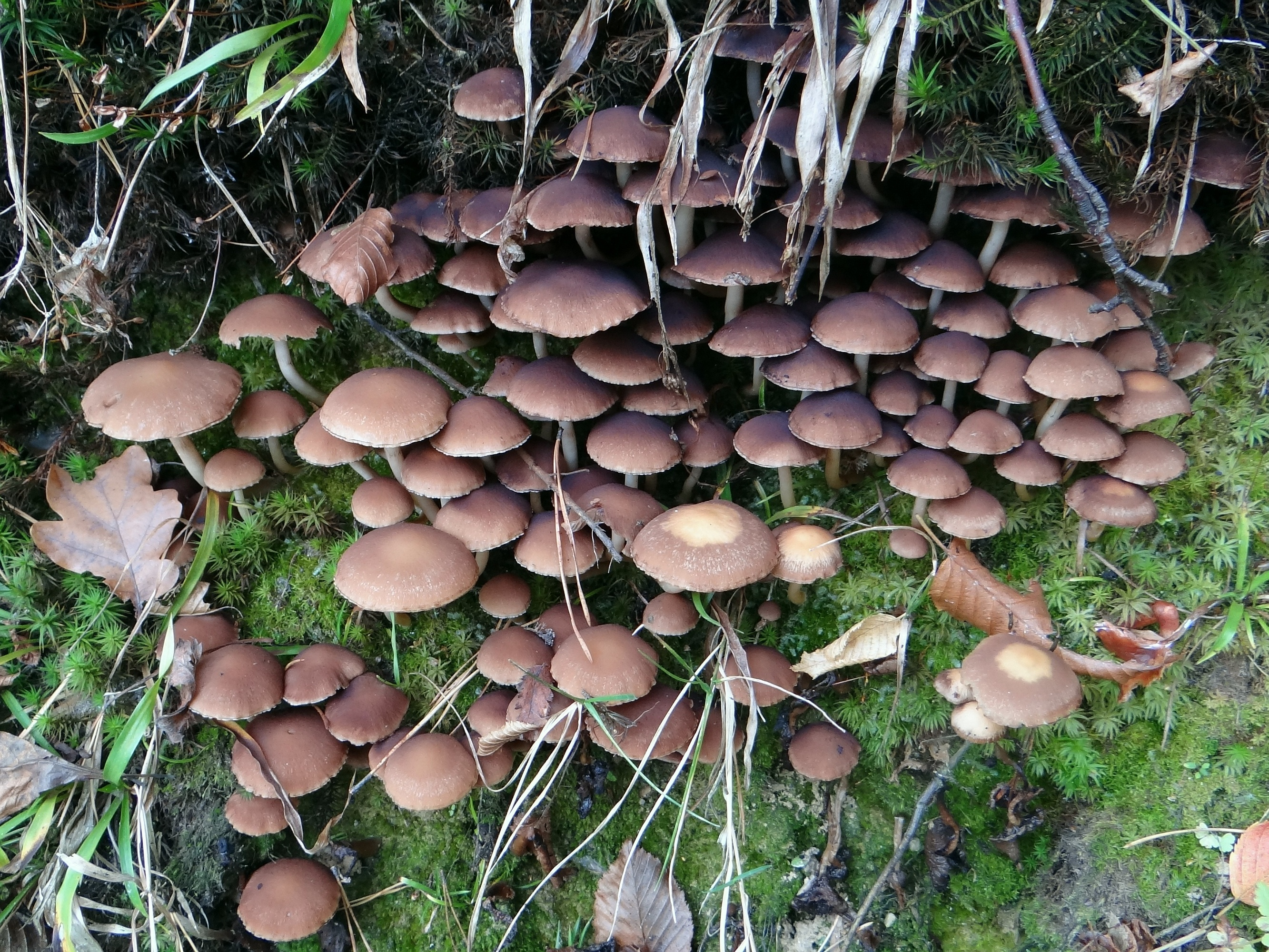 Psathyrella piluliformis